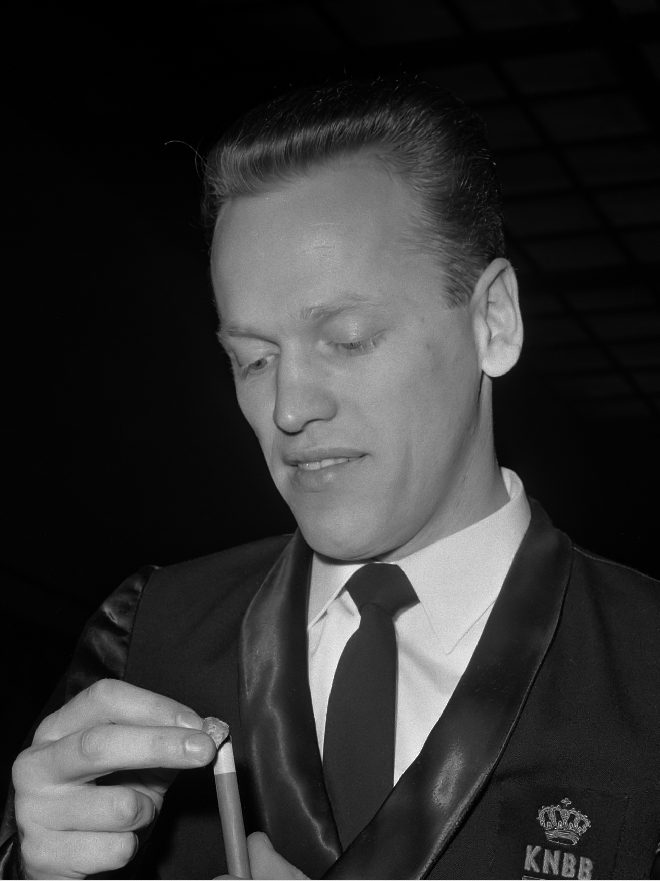 Europese Kampioenschappen Bandstoten in Krefeld, Hans Vultink 21 april 1966